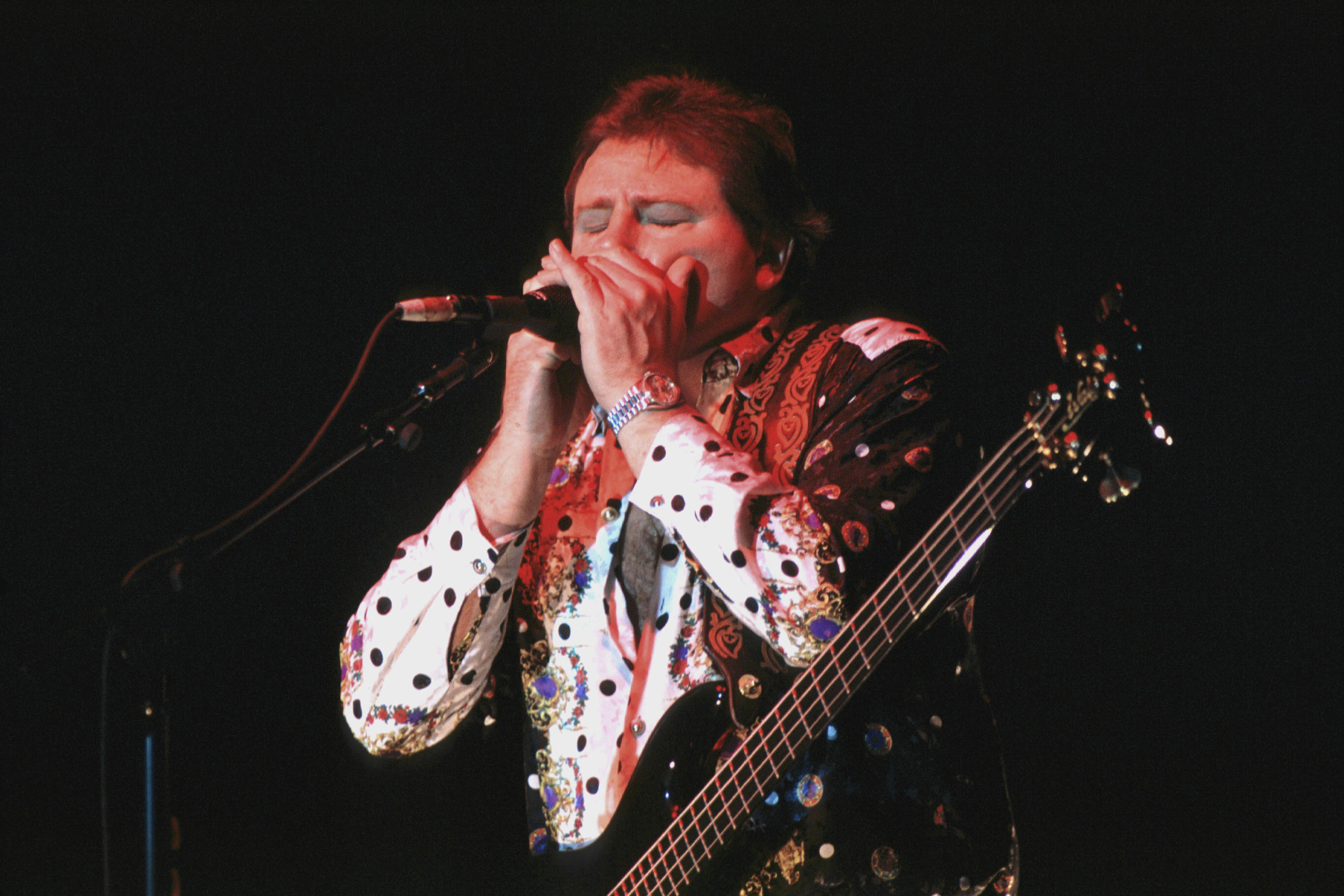 Greg Lake del gruppo progressive-rock Emerson, Lake & Palmer in concerto nel 1992